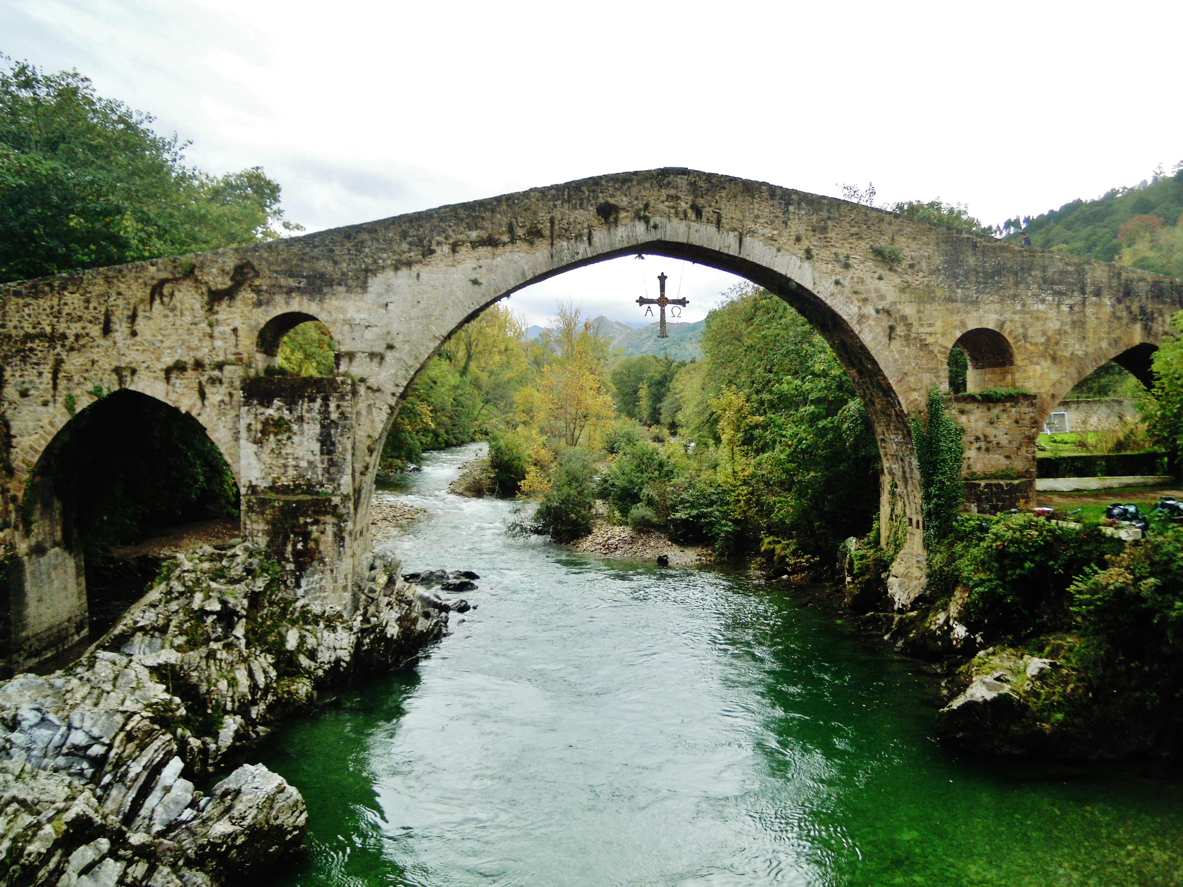 Ponte Romana de Cangues d'Onís (Asturies)